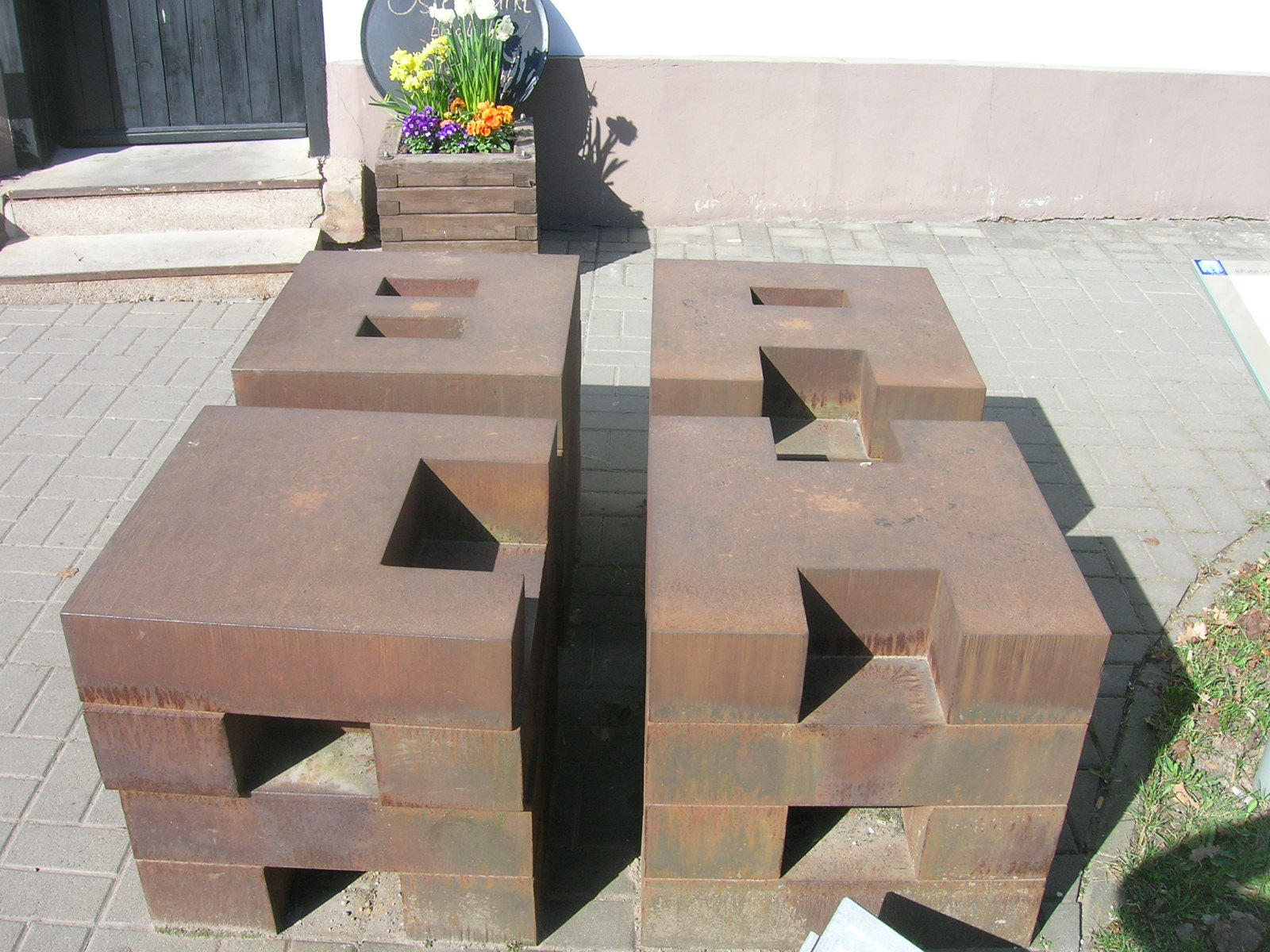 Wechmar, Skulptur "B-A-C-H" von Joachim Bandau (1992) vor dem Bachhaus